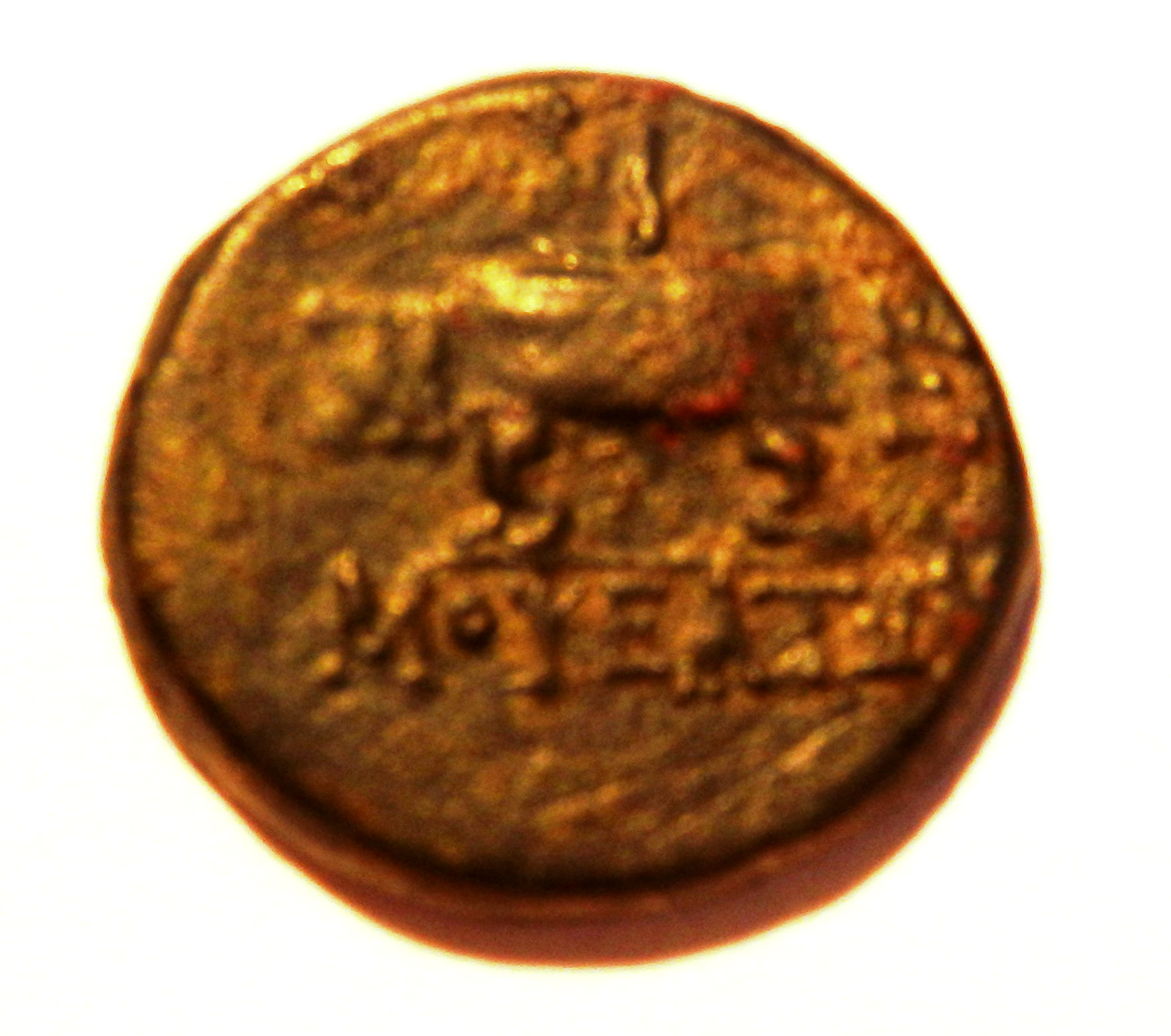 Rückseite der Münze mit Stadtnamen auf griechisch